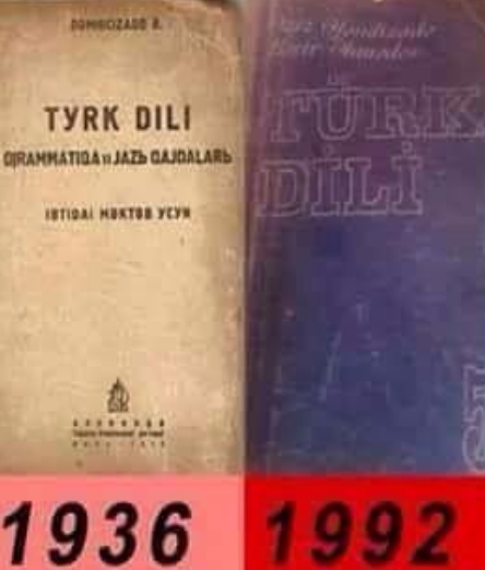 Azerice ders kitapları.